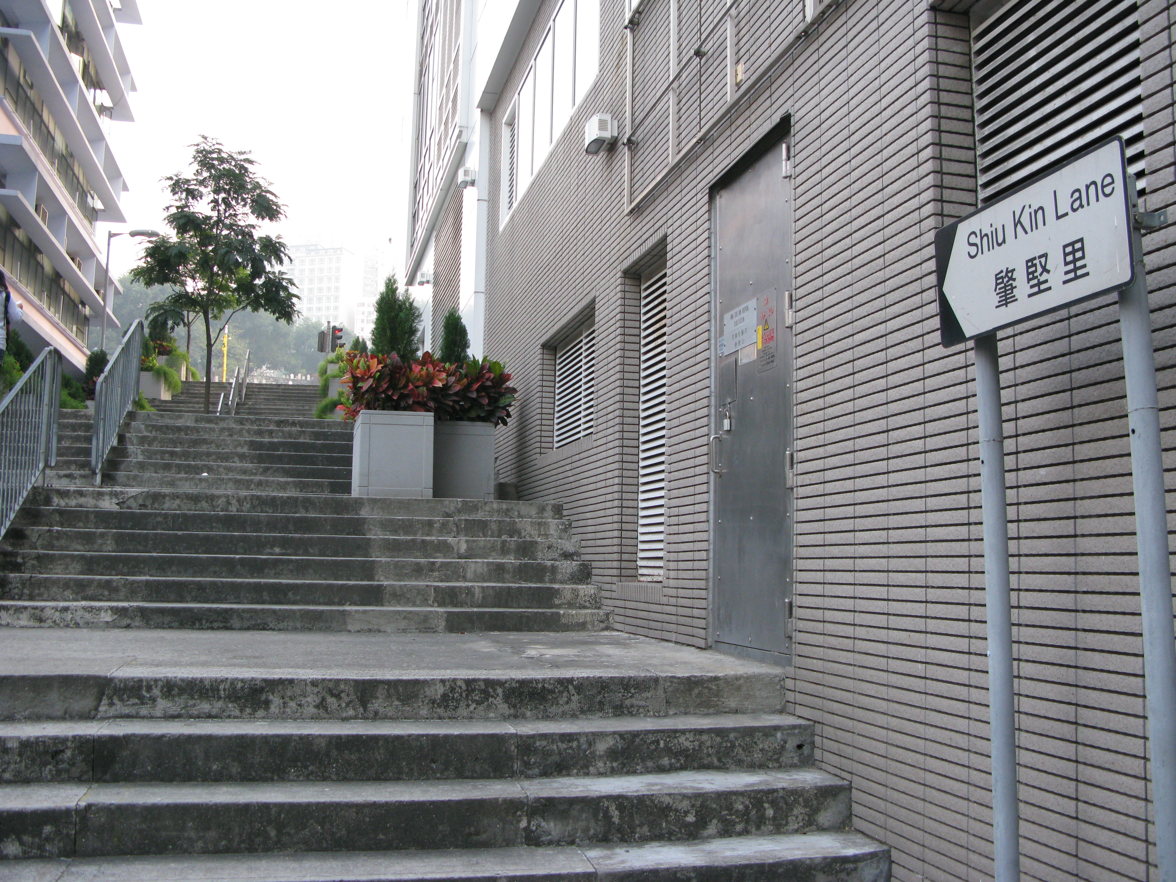 中文（香港）: 香港灣仔摩理臣山肇堅里